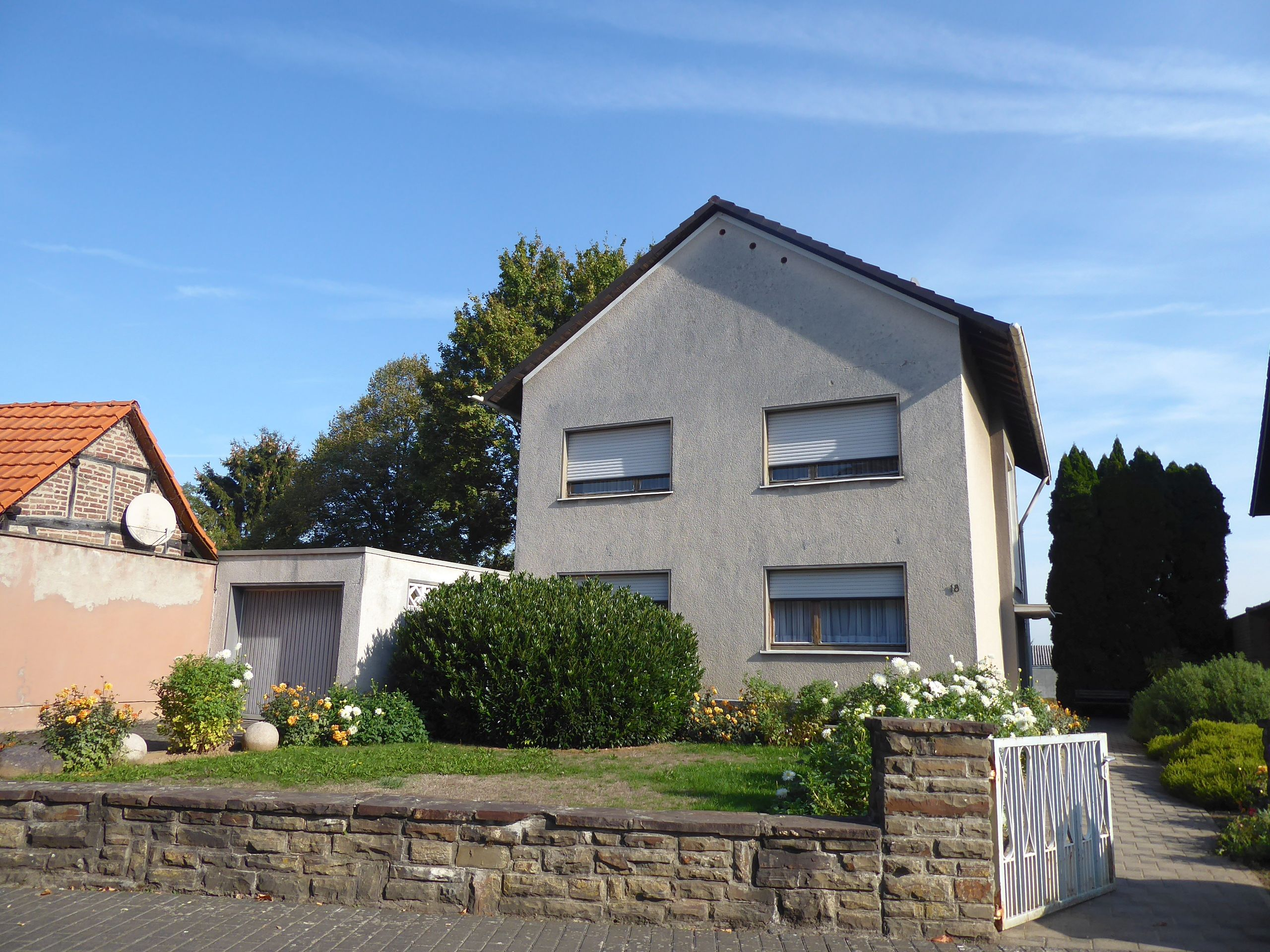 Hauptstraße, Walberberg, ARD "Wohnhaus Zielonka"